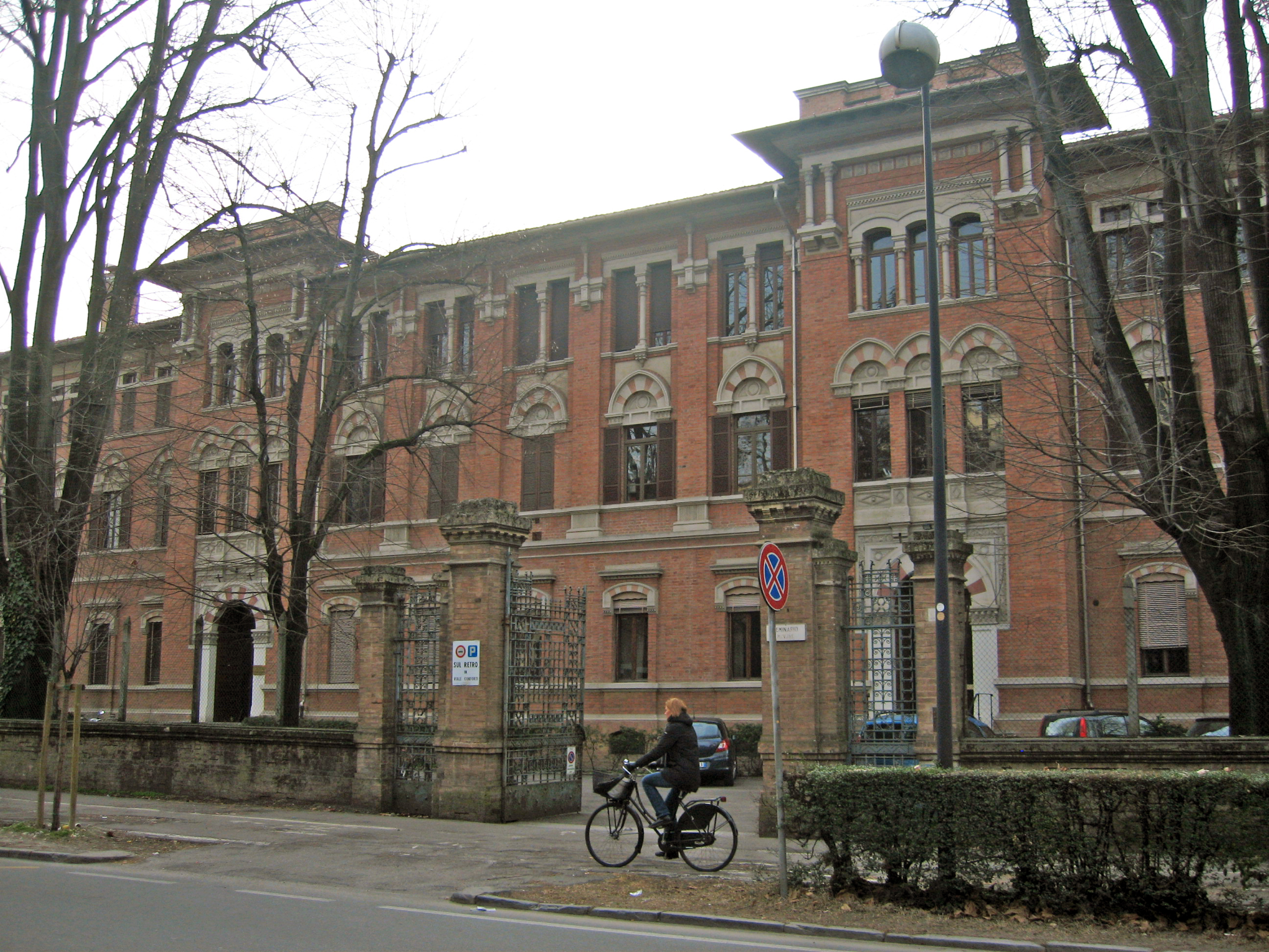 Seminario Minore (Parma - facciata principale